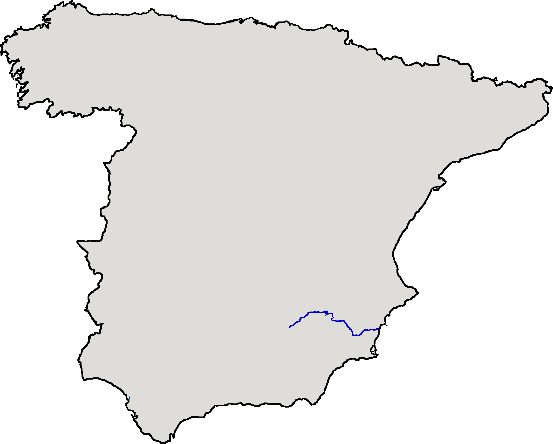 Localización del río Segura respecto de la España peninsular